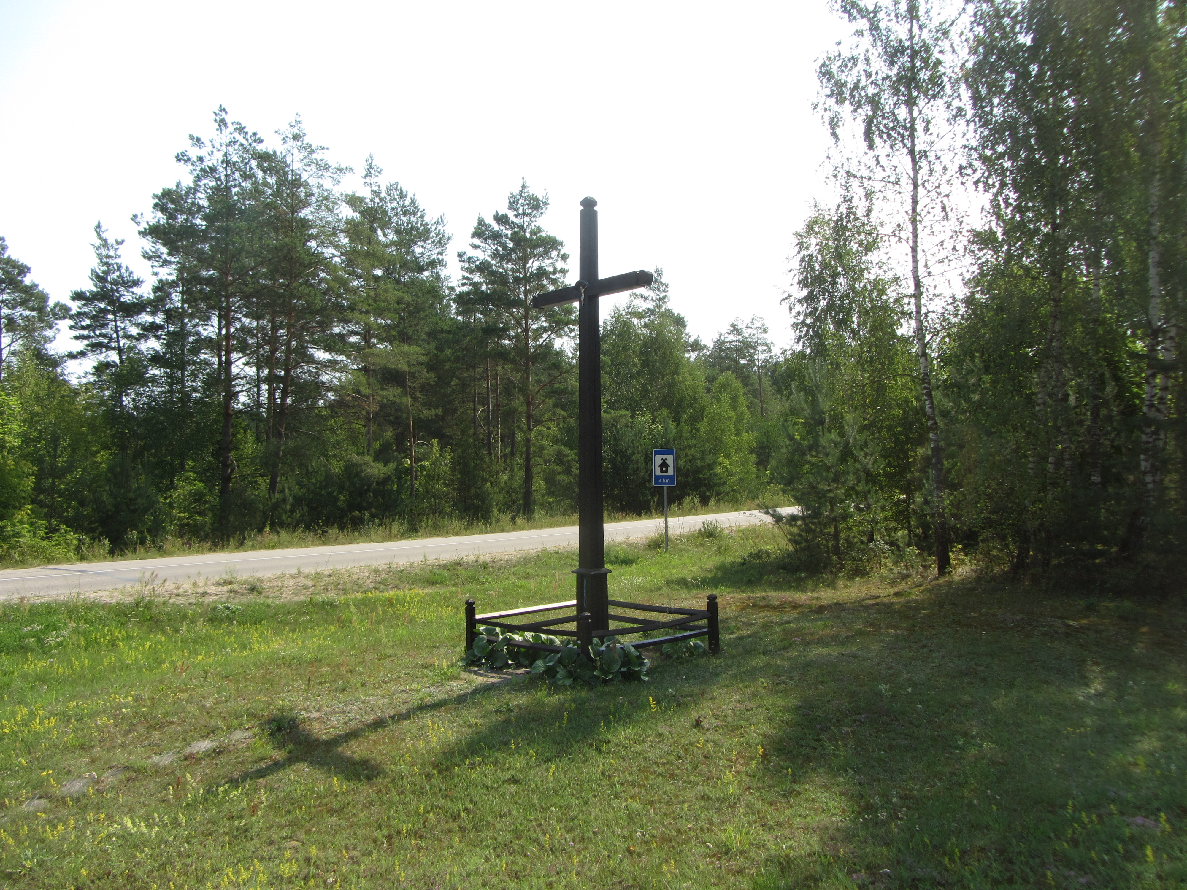 Kailiniai, Lithuania